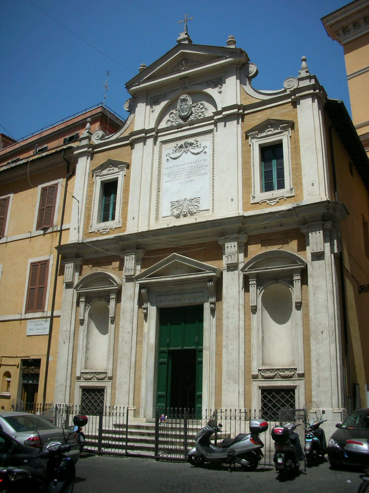 Façade, Oratorio del SS. Crocifisso, Rome